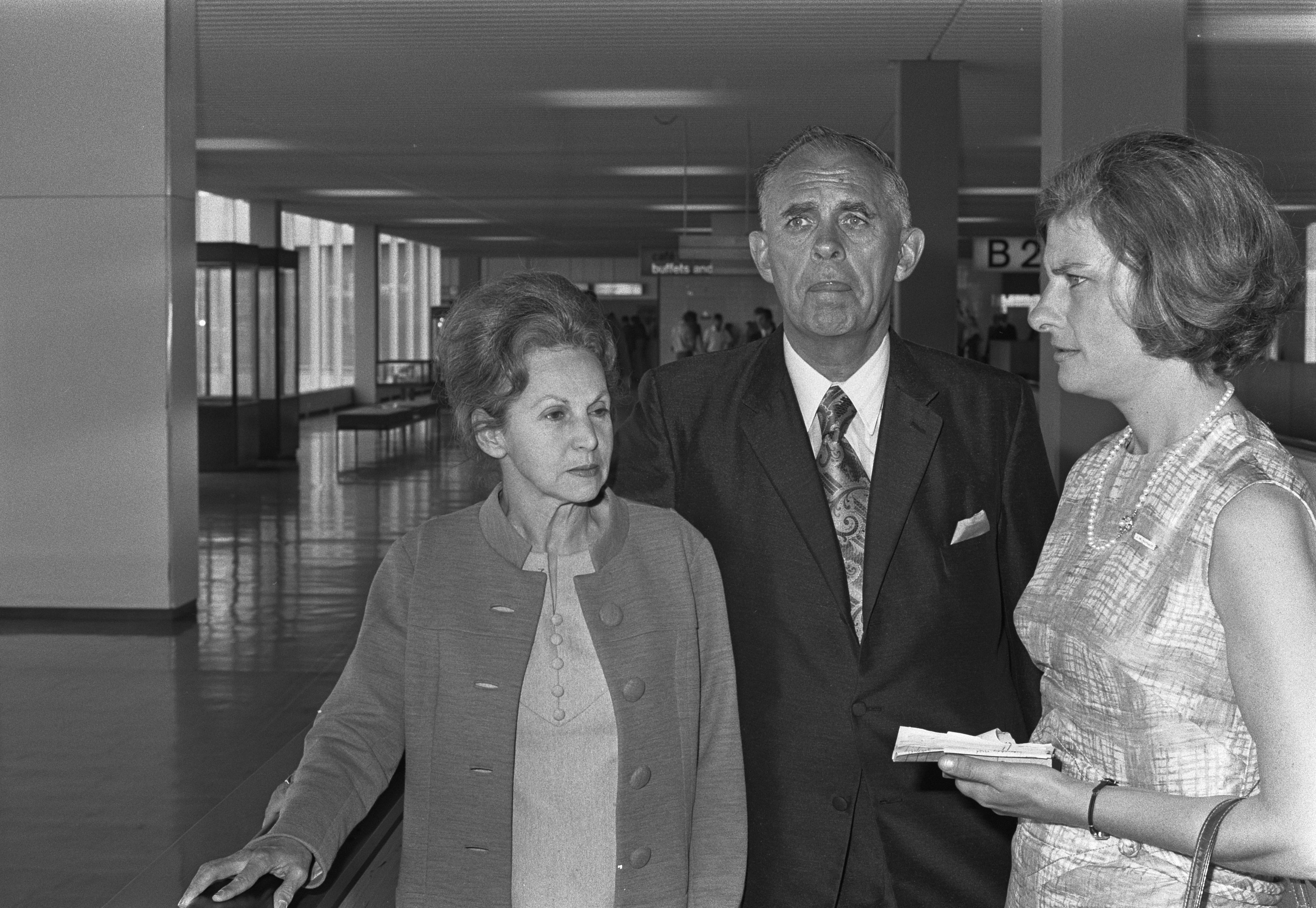 Collectie / Archief : Fotocollectie Anefo Reportage / Serie : [ onbekend ] Beschrijving : Minister Botha van Zuid-Afrika op Schiphol (kop) Datum : 7 juli 1972 Trefwoorden : ministers, vliegvelden Fotograaf : Mieremet, Rob / Anefo Auteursrechthebbende : Nationaal Archief Materiaalsoort : Negatief (zwart/wit) Nummer archiefinventaris : bekijk toegang 2.24.01.05 Bestanddeelnummer : 925-7264